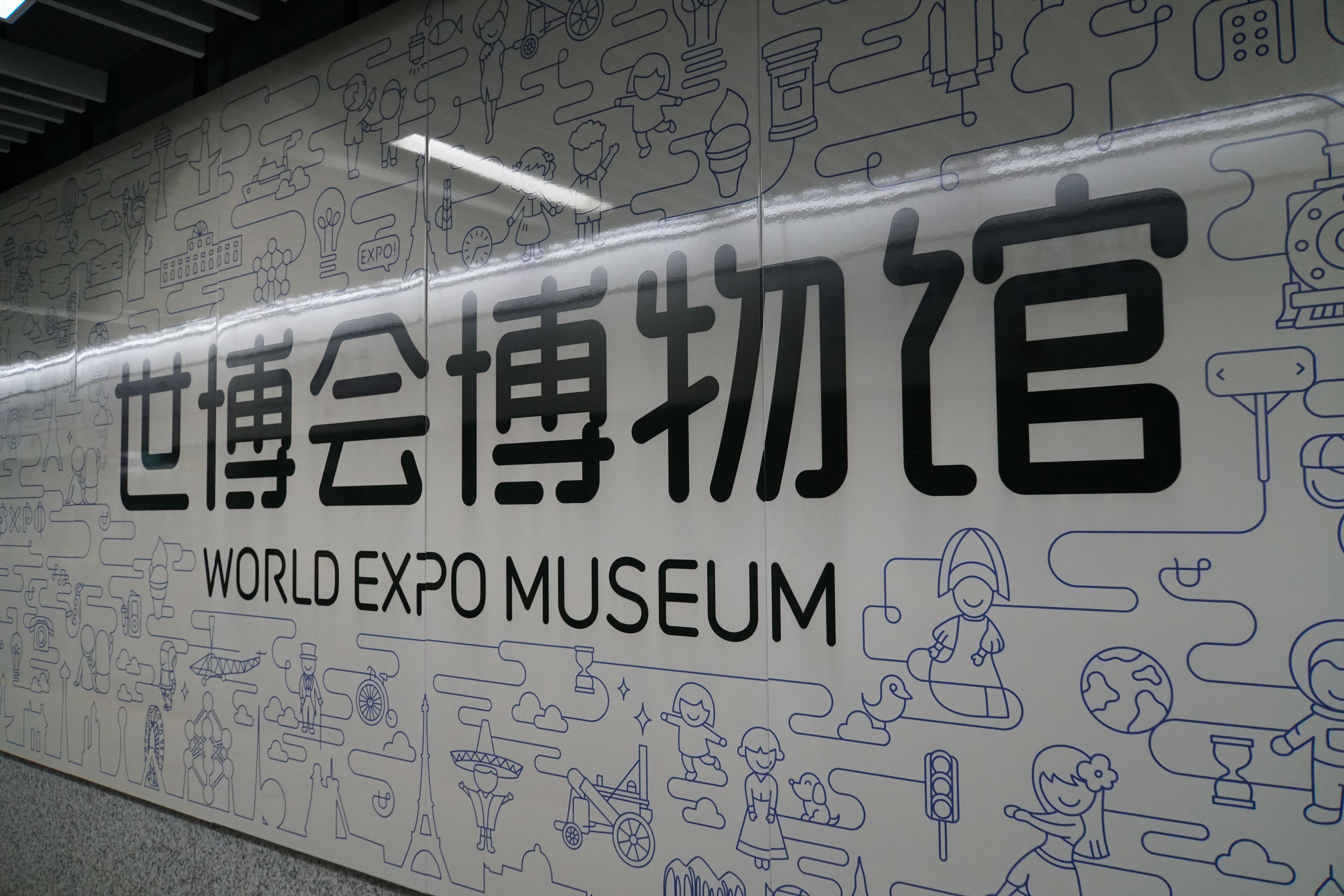 世博会博物馆站大字壁